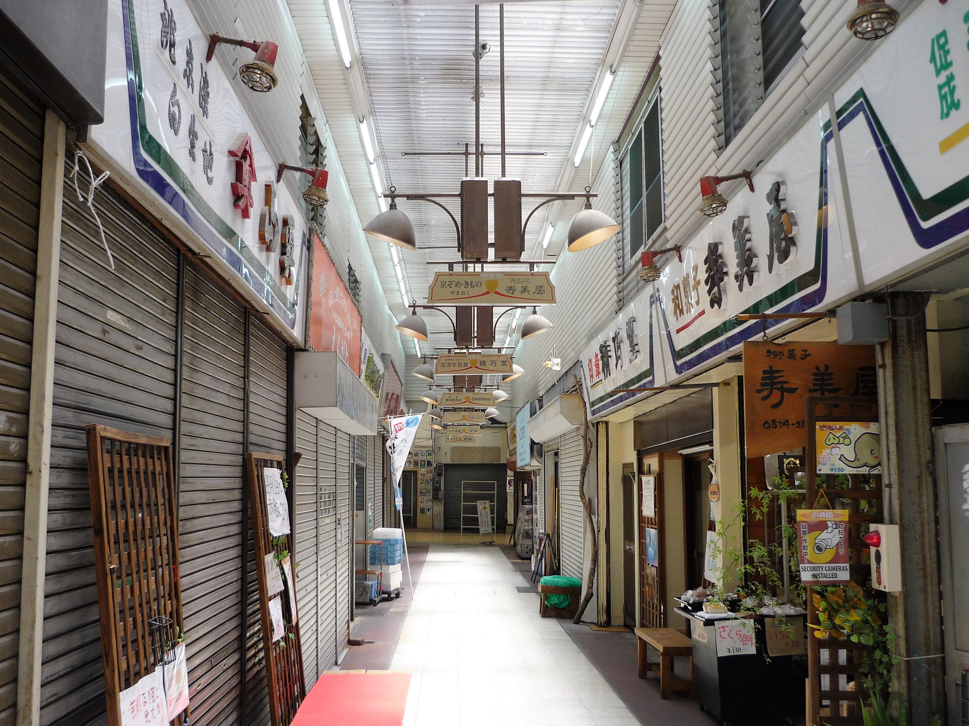 徳山駅前の中央街（商店街）